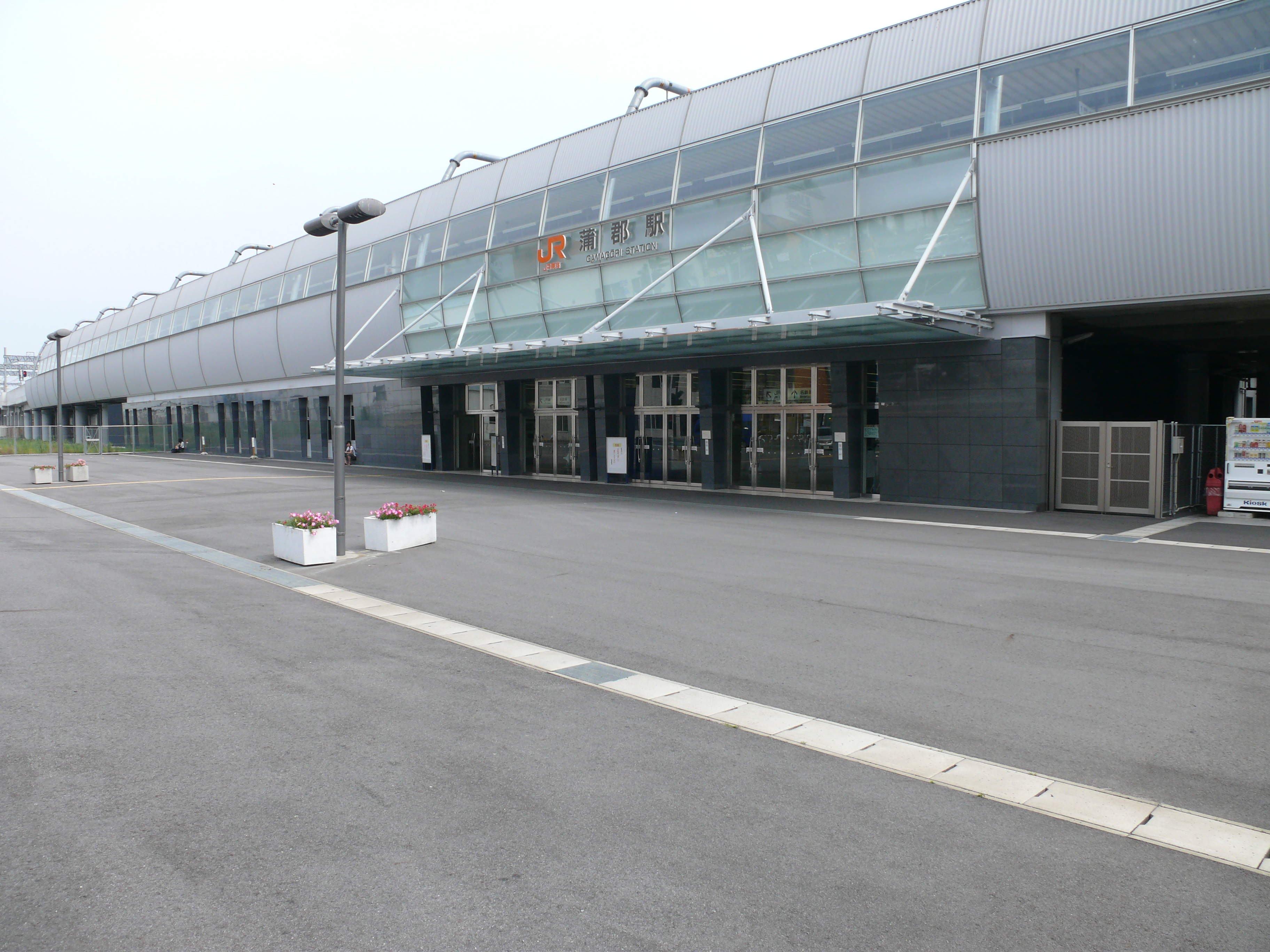 愛知県蒲郡市にあるJR東海の蒲郡駅。